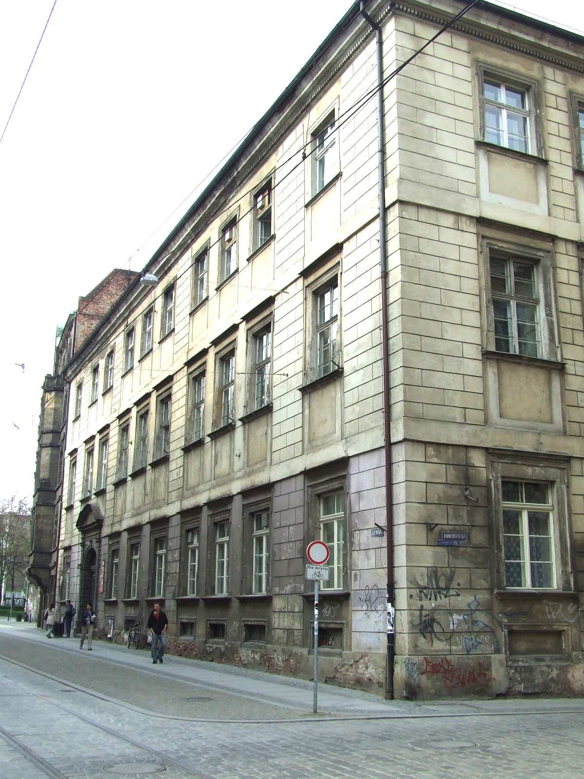 Główna Siedziba Wrocławskiej Policji, miejsce pracy Eberharda Mocka, dziś ulica Szewska (Shuhbrucke) 49, mieszcząca Instytut Filologii Klasycznej i Kultury Antycznej jak i Historii